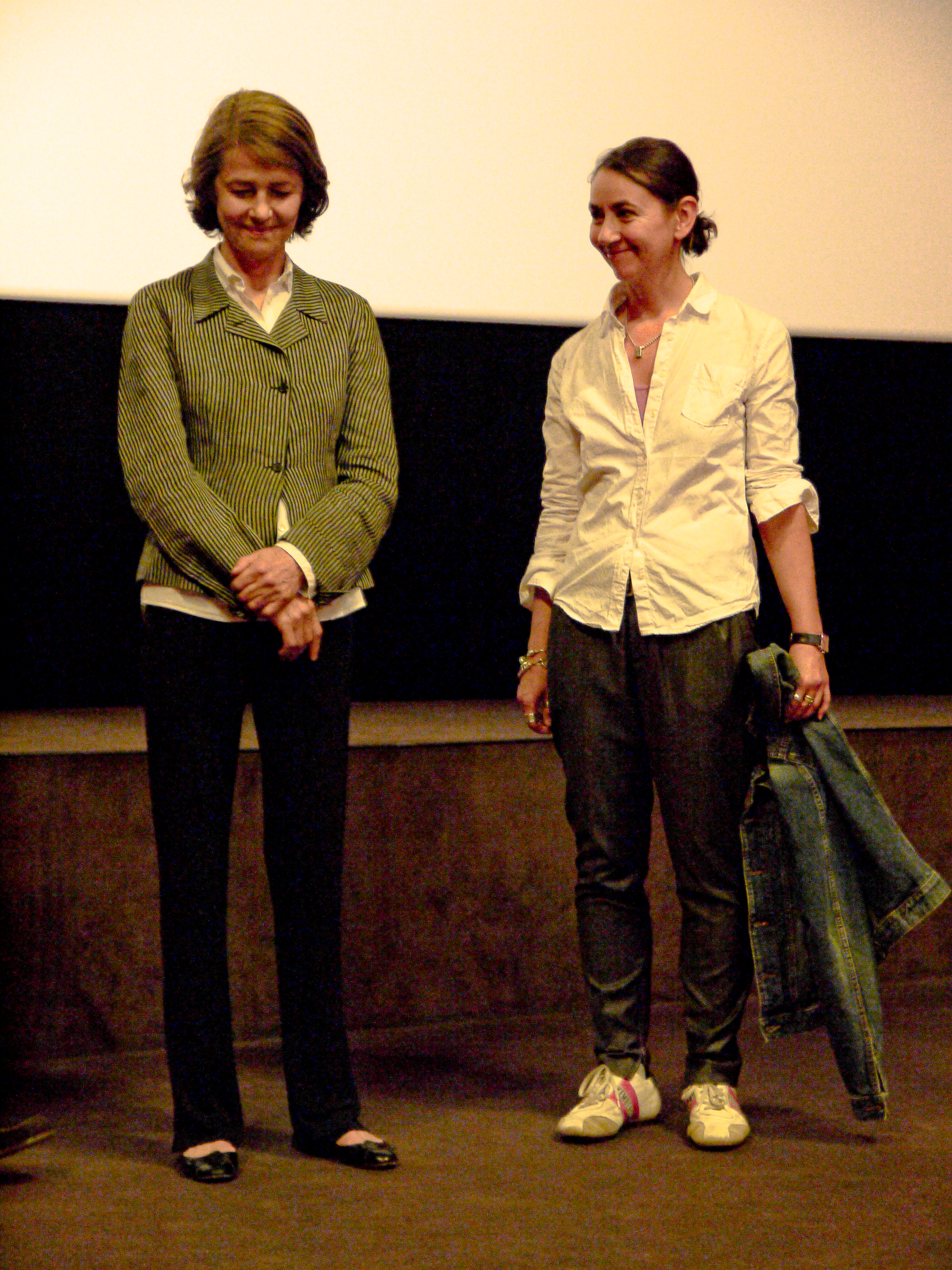 Charlotte Rampling & Angelina Maccarone Festival Paris Cinéma 2011.